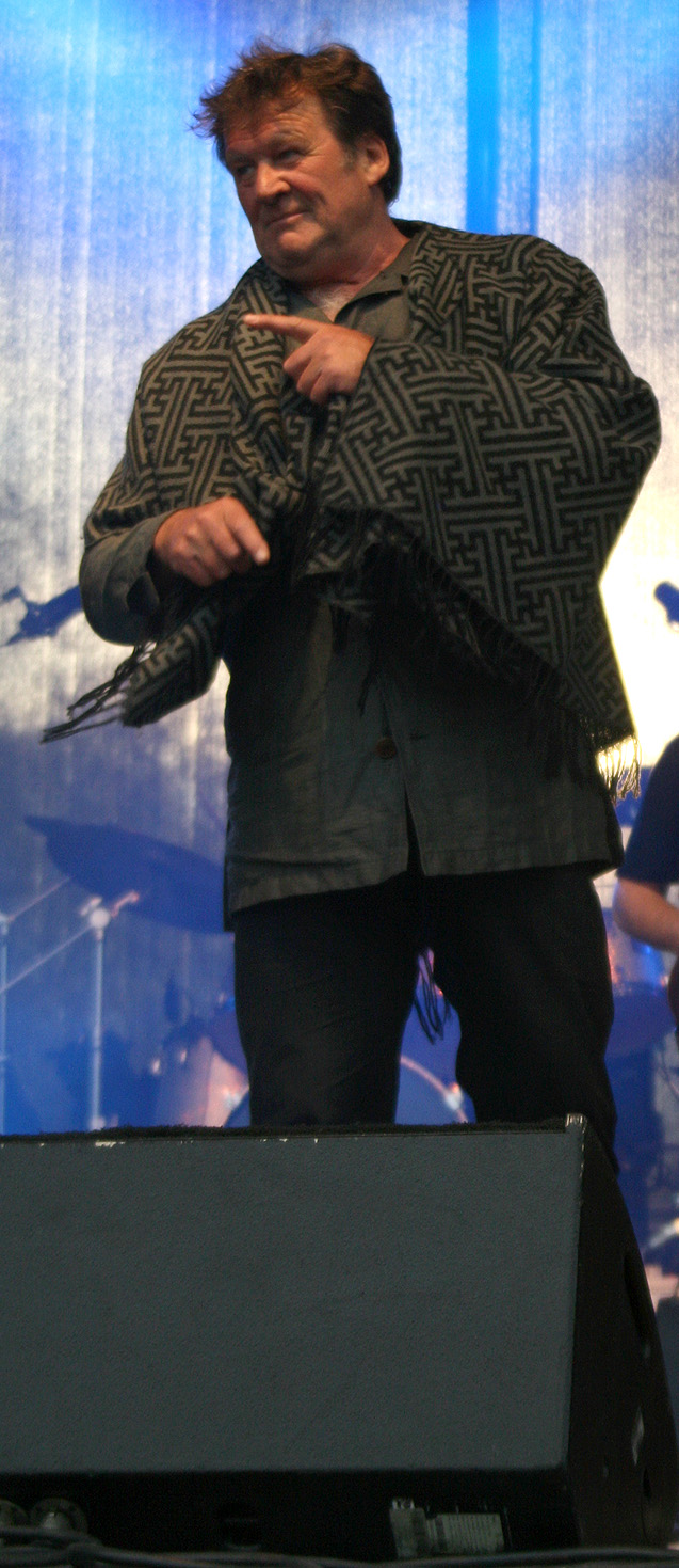 Der österreichische Sänger Wilfried bei einem Konzert zum Ersten Mai im Wiener Prater.